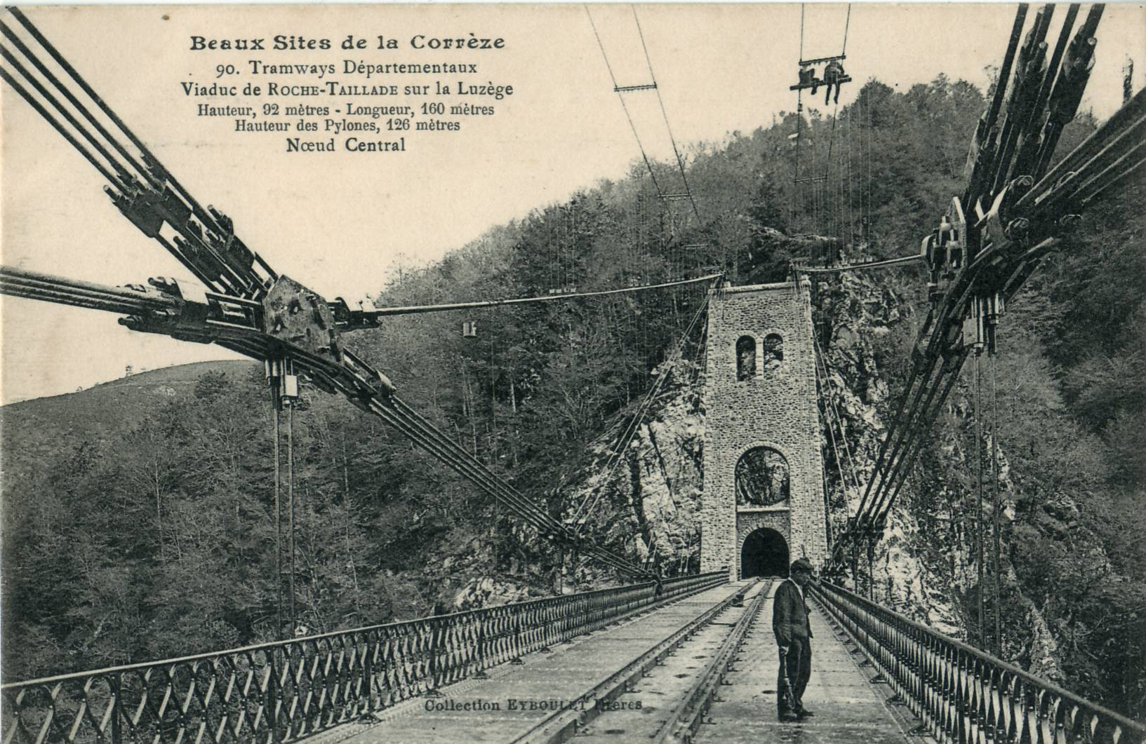 Carte postale ancienne éditée par Eybouletfrères, n°90, collection Beaux Sites de la Corrèze : Tramways départementaux - Viaduc de Roche-Taillade sur la Luzège : Hauteur, 92 m. - Longueur, 160 m. - Hauteur des pylones, 126 m. : Nœud central